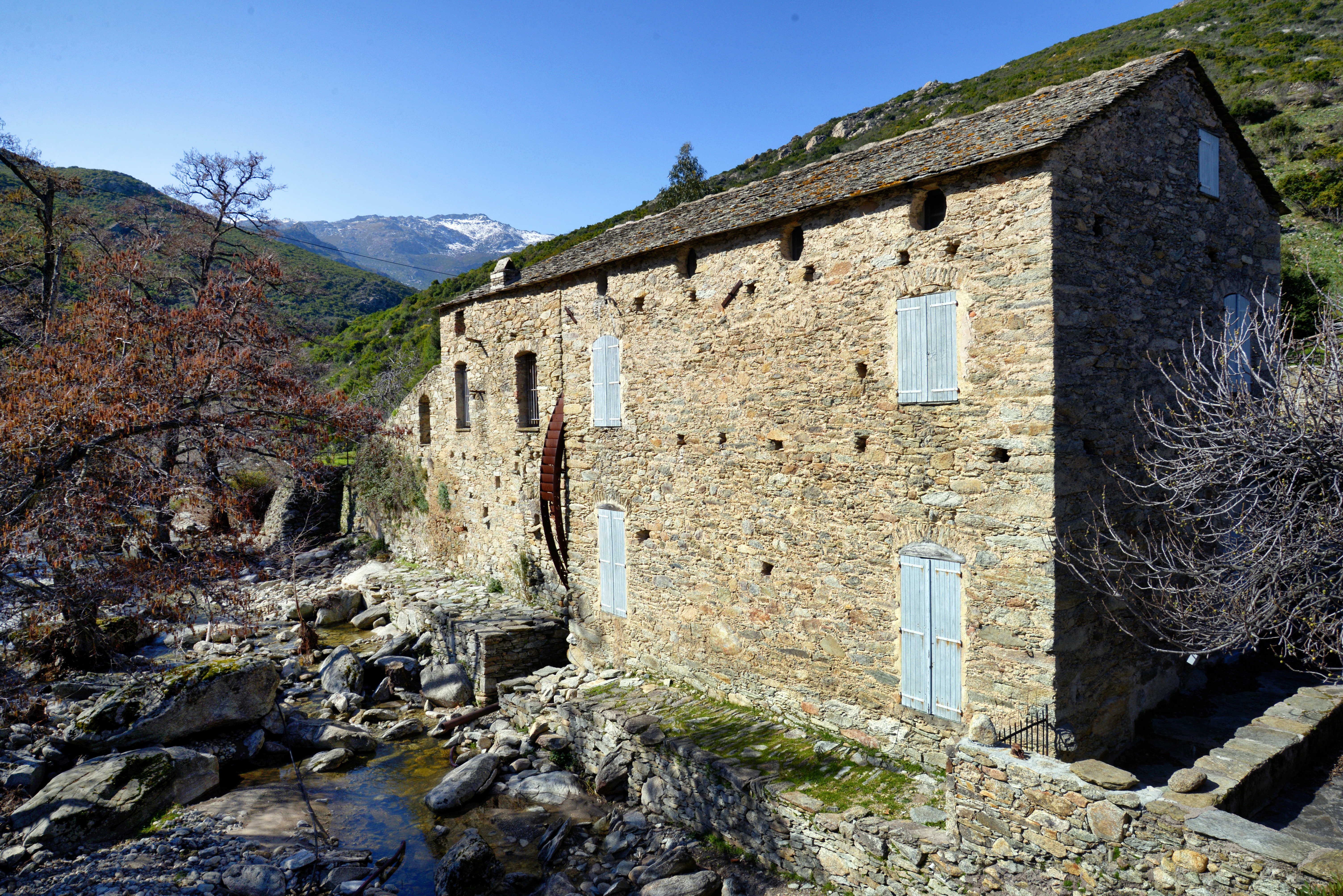 Santo-Pietro-di-Tenda, Nebbio (Corse) - Le moulin de Salti sur le ruisseau du même nom